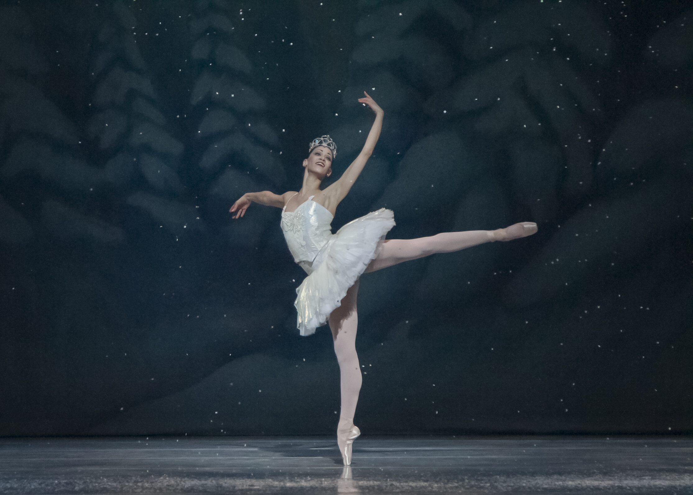 バレエ 『くるみ割り人形』 の第1幕で雪の女王を踊るアンジェリーナ・サンソン。米国カンザスシティ・バレエ団の2013年12月公演にて。